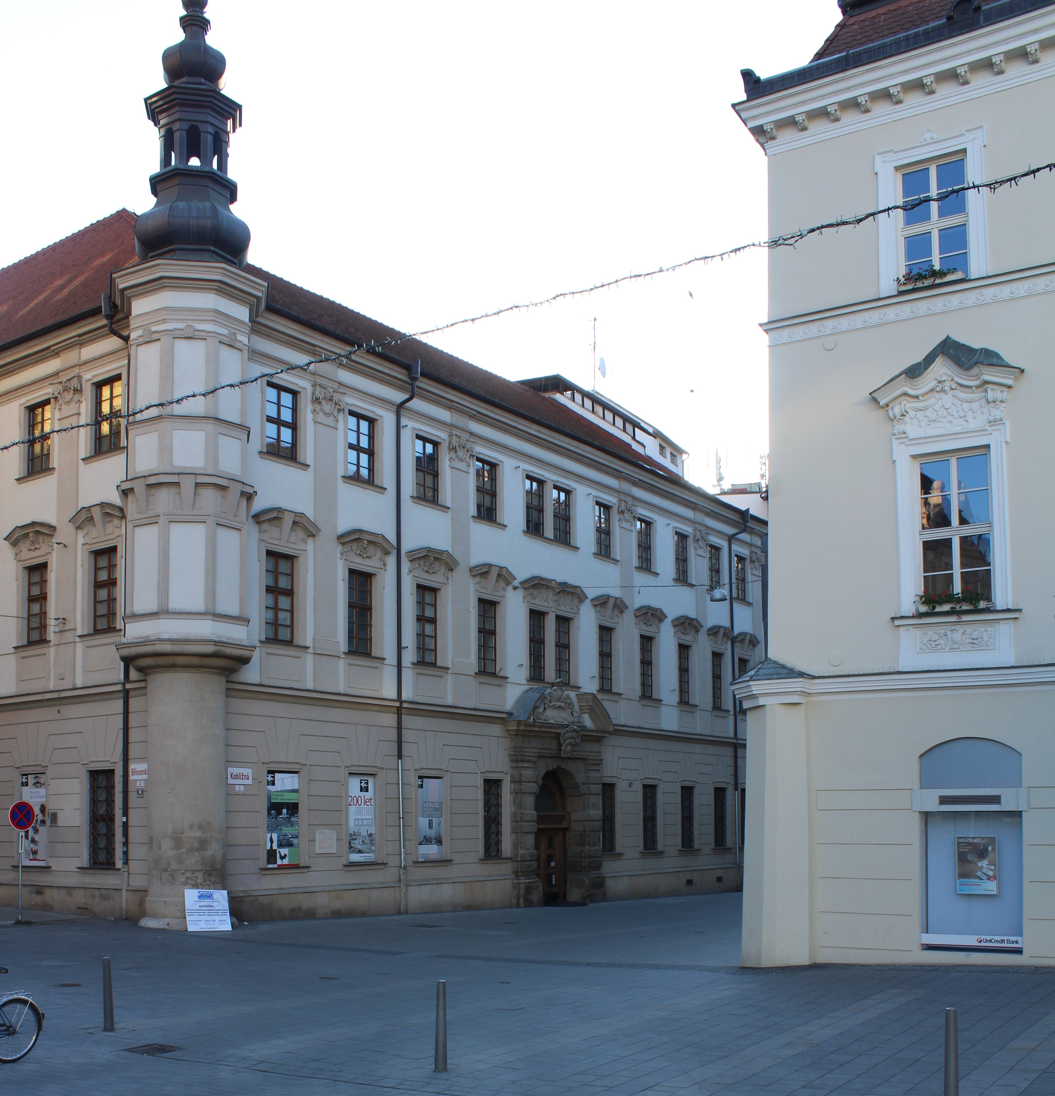 Moravské zemské muzeum - "Palác šlechtičen"